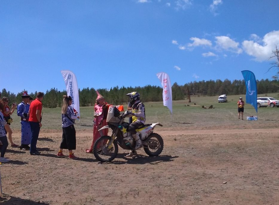 Шелковый путь-2019. Мотоциклиста встречают на финише этапа Бабушкин-Харгана